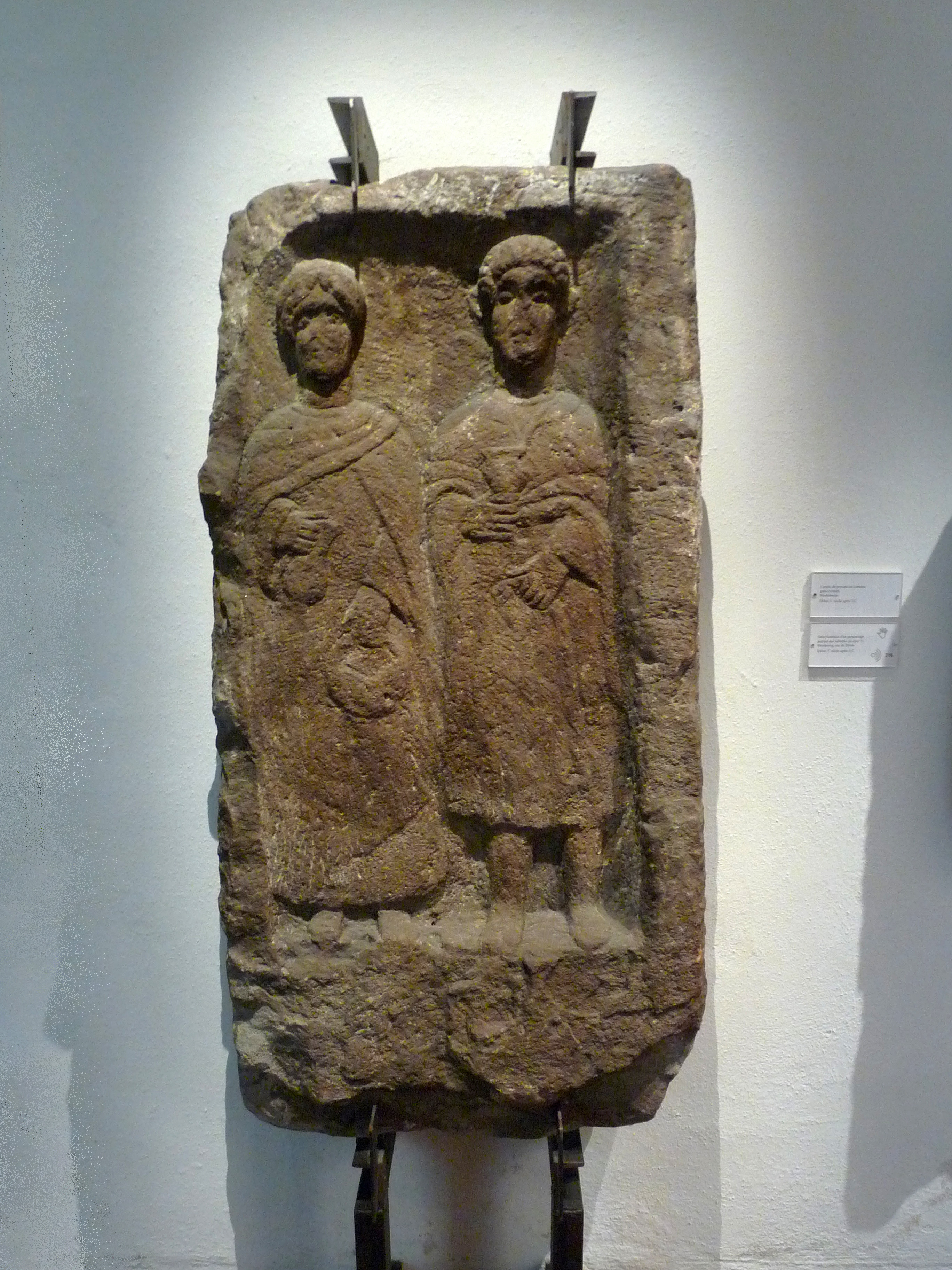 Couple de paysans en costume gallo-romain. Début du 4e siècle après JC. Trouvé à Marlenheim. Musée archéologique de Strasbourg